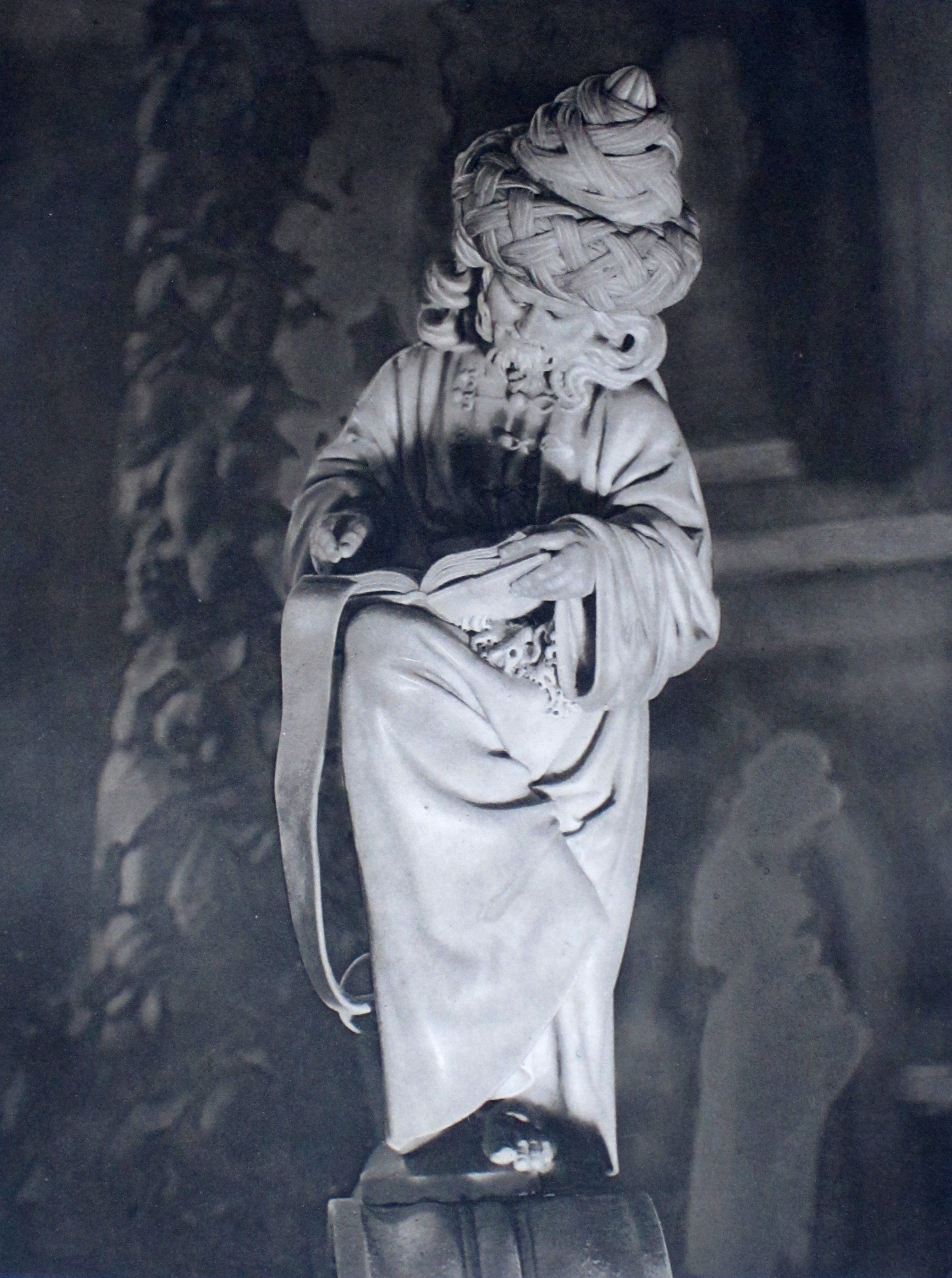 Saint Marc. Marbre.